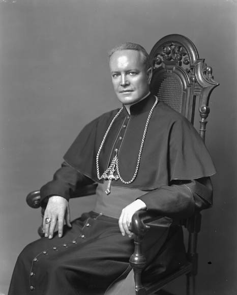 Monseigneur Joseph Charbonneau. Archbishop of Montreal 1940-1950